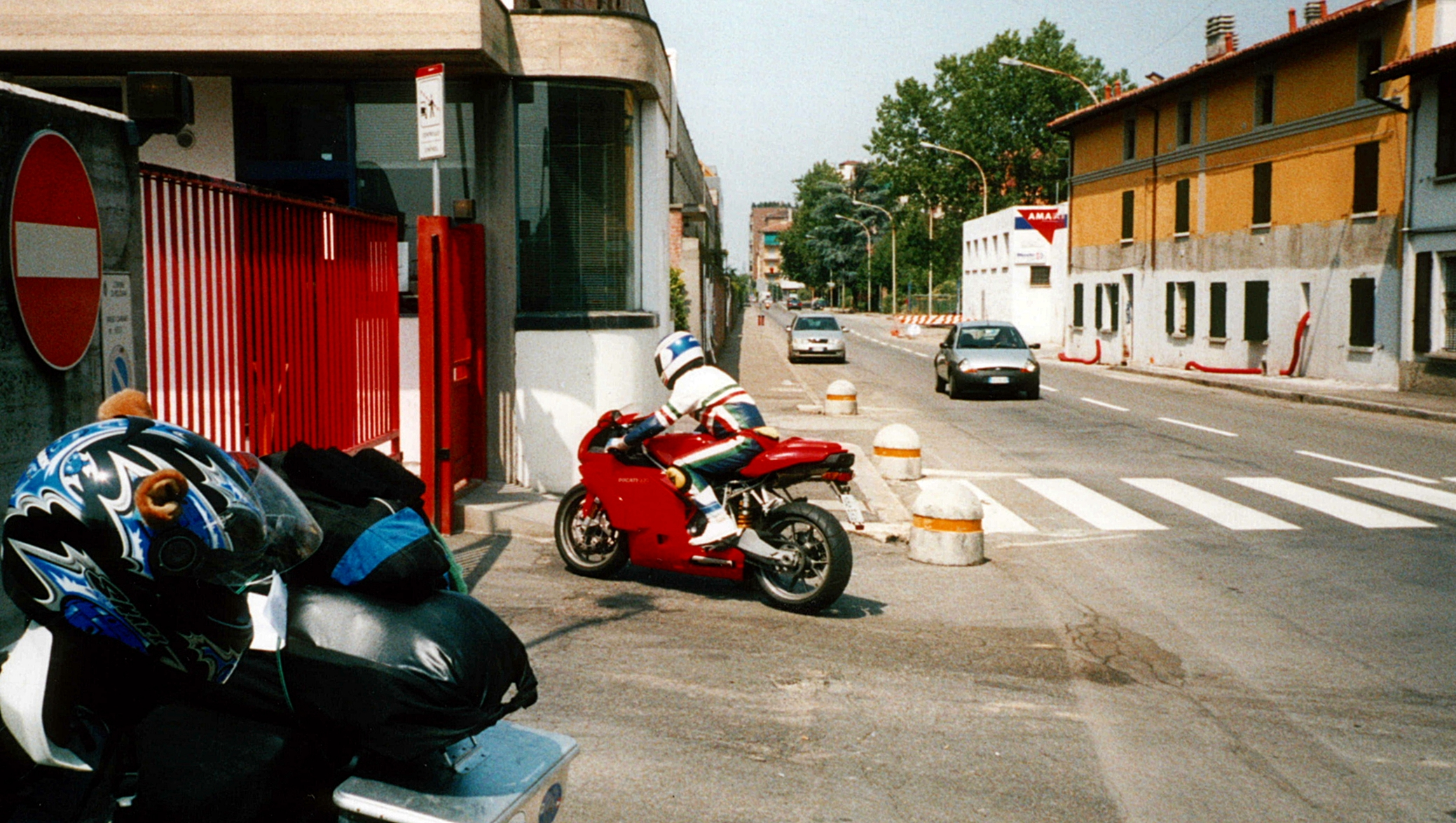 Ducati Werk Einfahrt. Die 999 war gerade eine Woche vorher der Öffentlichkeit vorgestellt worden, der Testfahrer war weniger begeistert über das schnelle zücken meines Fotoapparates und hatte es plötzlich recht eilig, davon zu kommen.